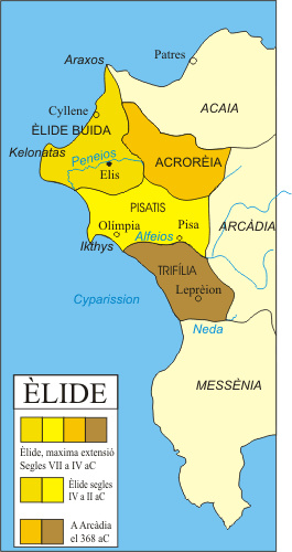 Èlide (Elis), mapa